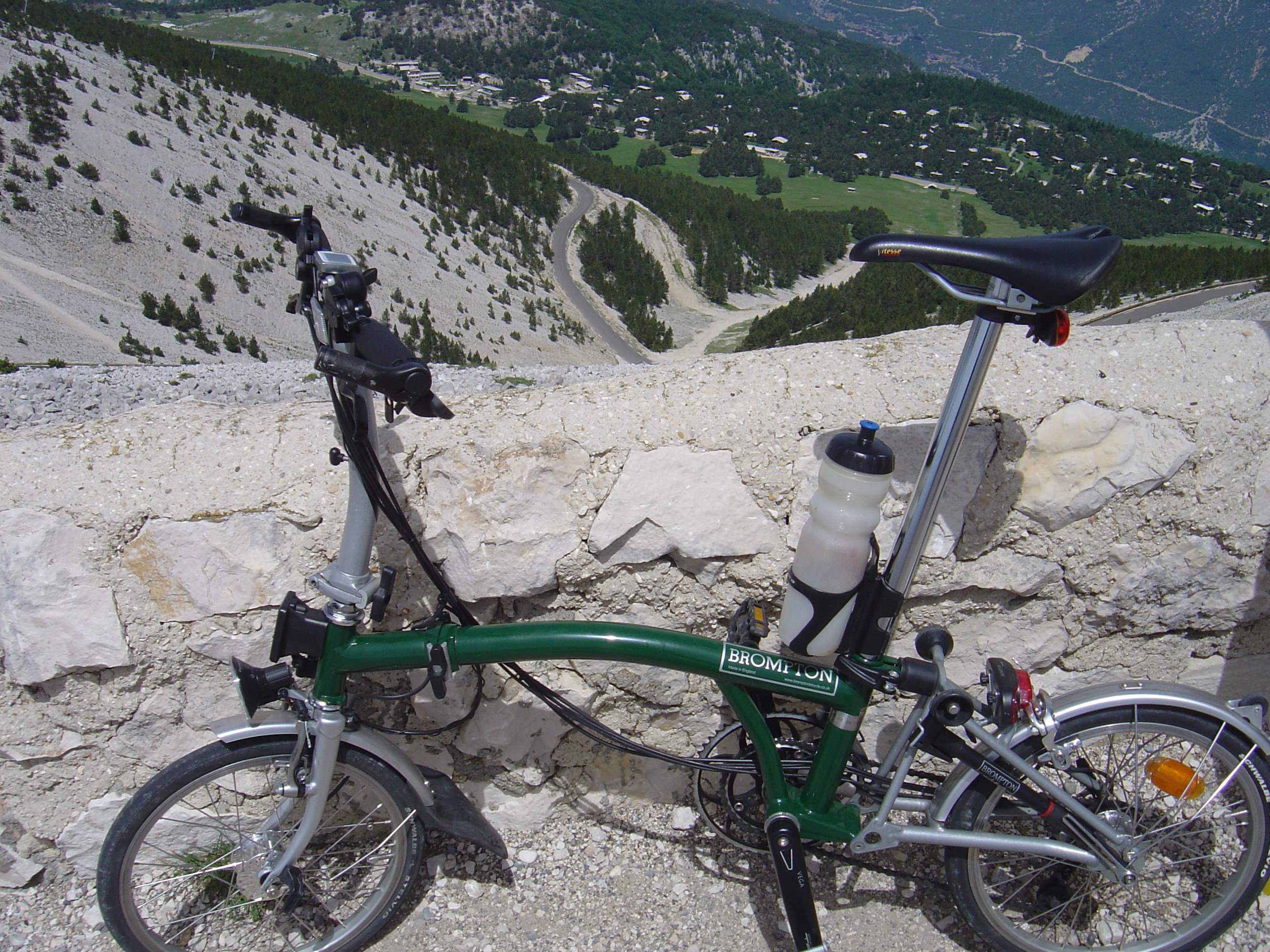 Brompton S6L avec double plateau 34/54 dents au sommet du Mont Ventoux